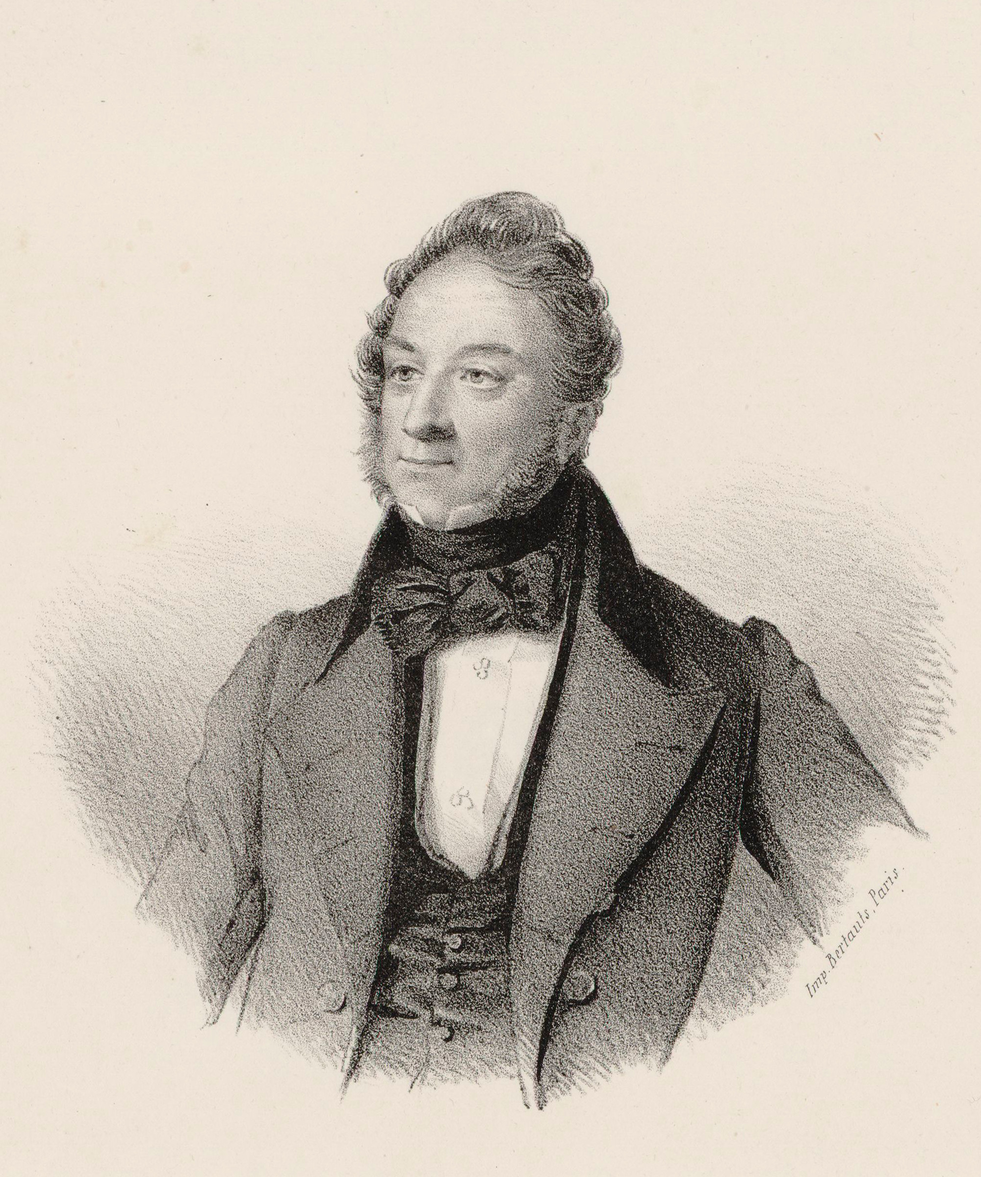 Catterino Cavos, directeur de la musique des théâtres impériaux, St-Petersbourg